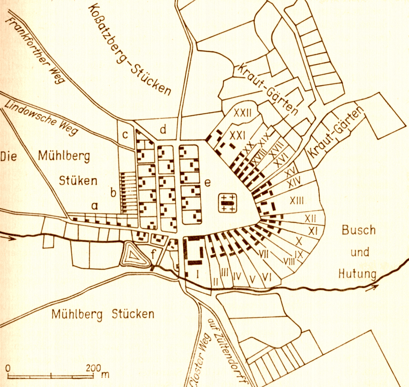 Flurkarte von Krebsjauche aus dem Jahre 1760, heute Wiesenau, Amt Brieskow-Finkenheerd, Brandenburg